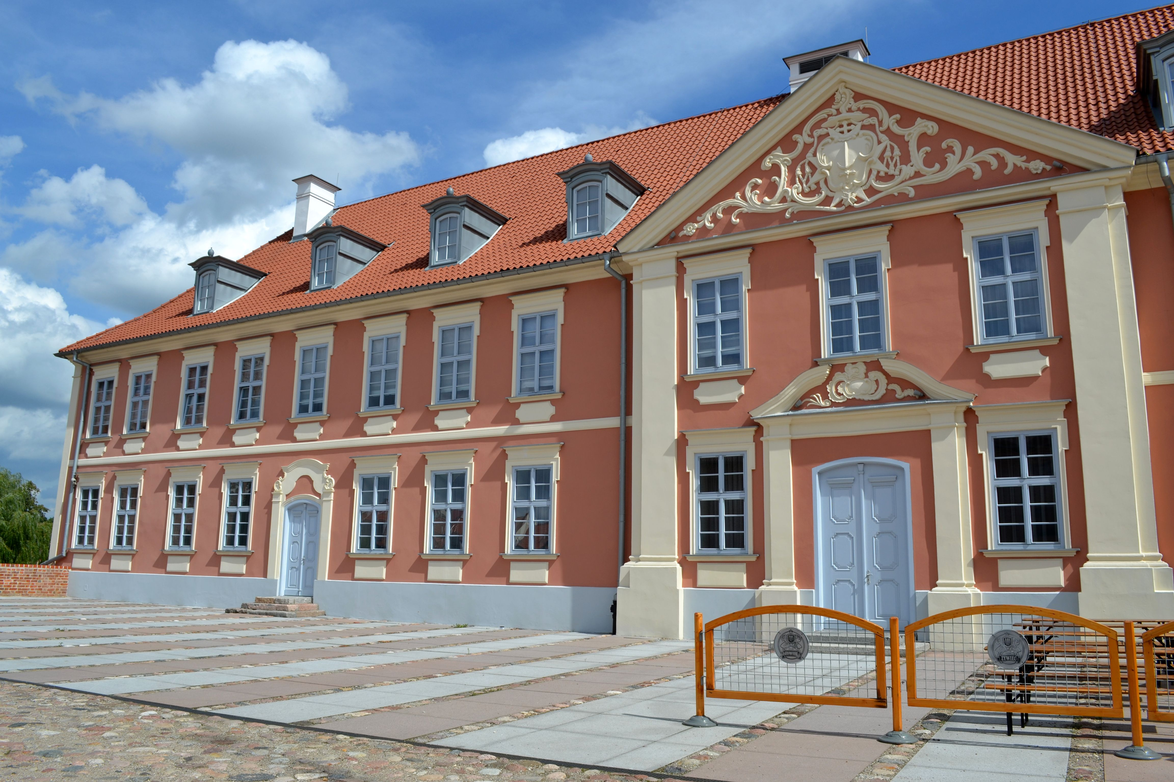 Lidzbark Warmiński, zespół zamku biskupiego, XIV, XIX